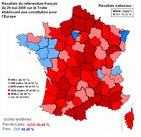 Résultats par départements du référendum sur la constitution européenne du 29 mai 2005 en France.